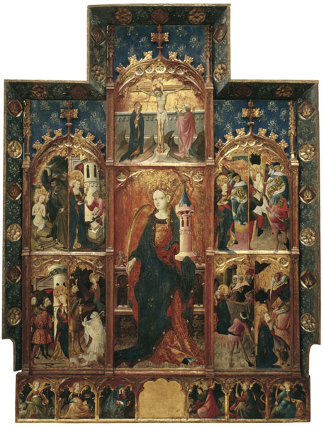 Retaule de Santa Bàrbara- Gonçal Peris Sarrià. MNAC